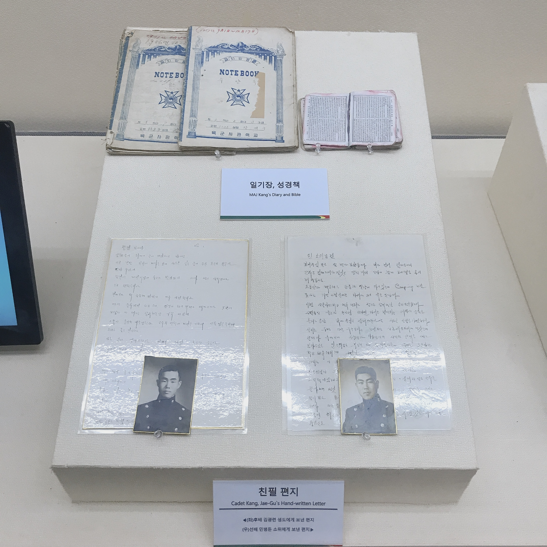 강재구소령유품2